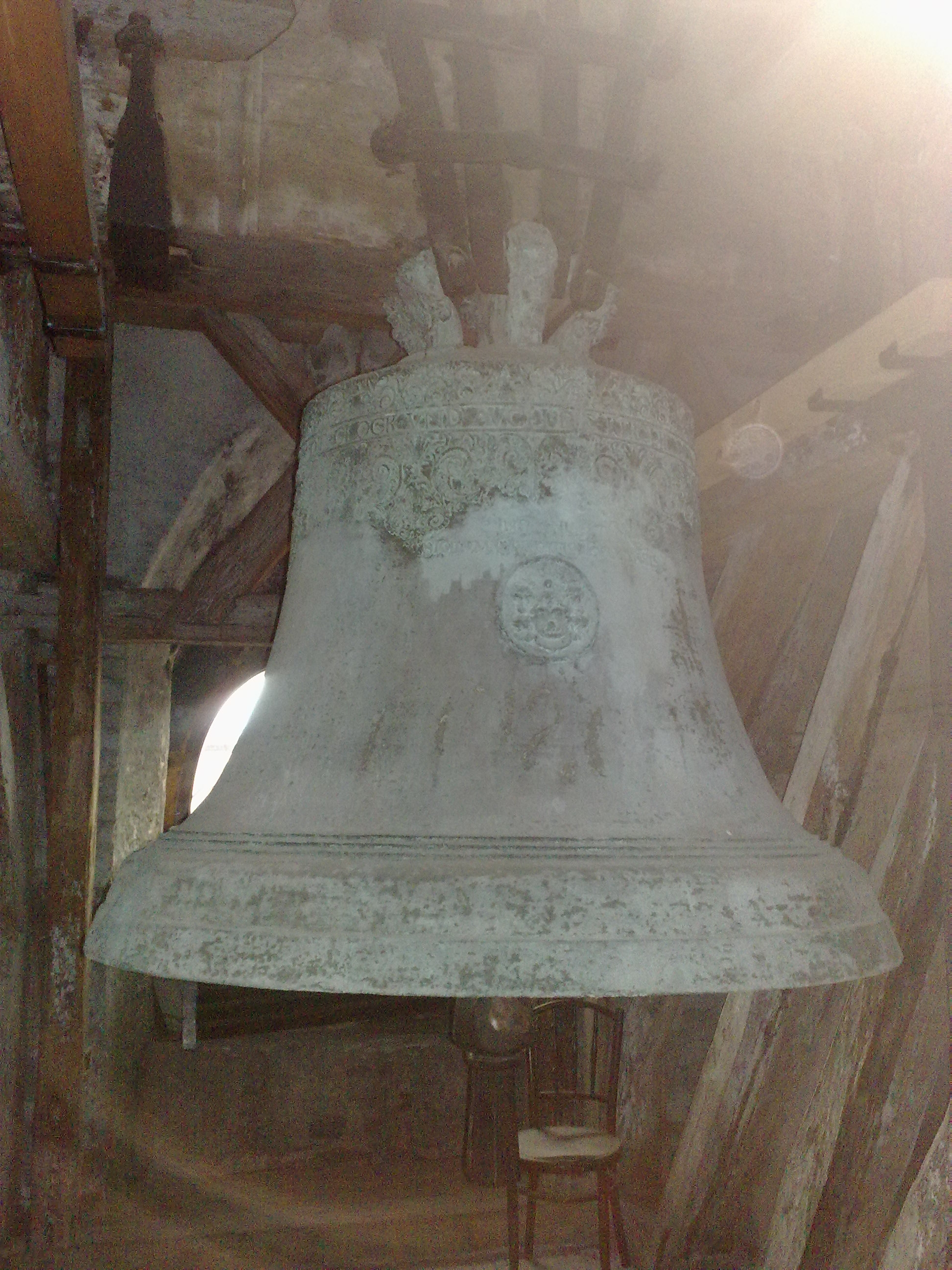 Teplický kostel svatého Jana Křtitele.